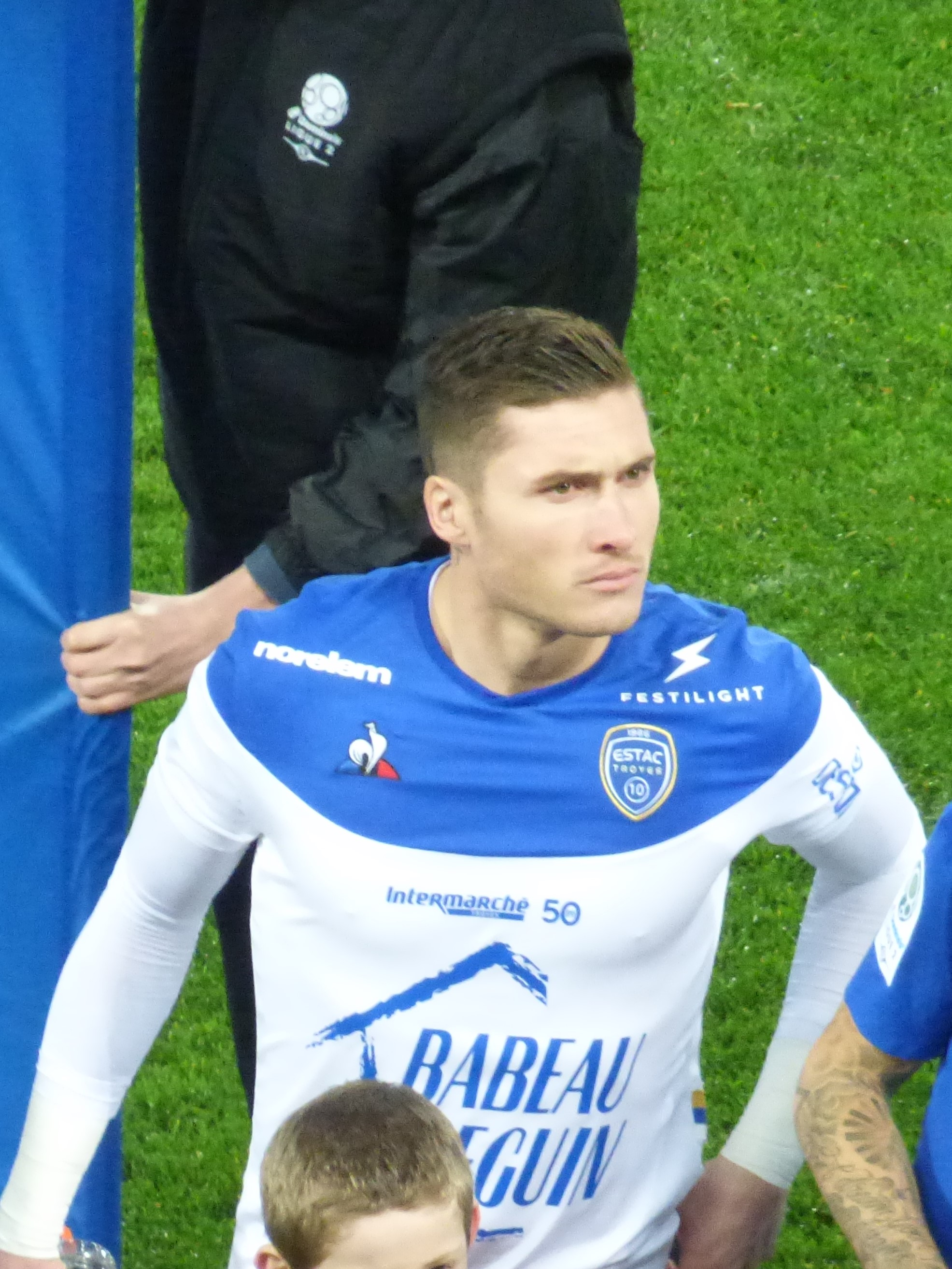 Gauthier Gallon lors du match RC Lens / ES Troyes AC, comptant pour la vingt-troisième journée du championnat de France de football de Ligue 2 2019-2020, le 4 février 2020, au Stade Bollaert-Delelis de Lens